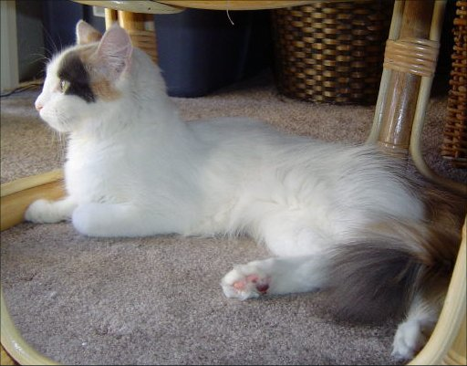 Turecká van v želvovinovém zbarvení.